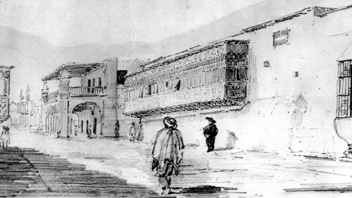 Aparece en primer plano la "Casa de la Marqueza de Herrera, viuda de Bracamonte"; en la esquina el antíguo "Palacio Municipal".